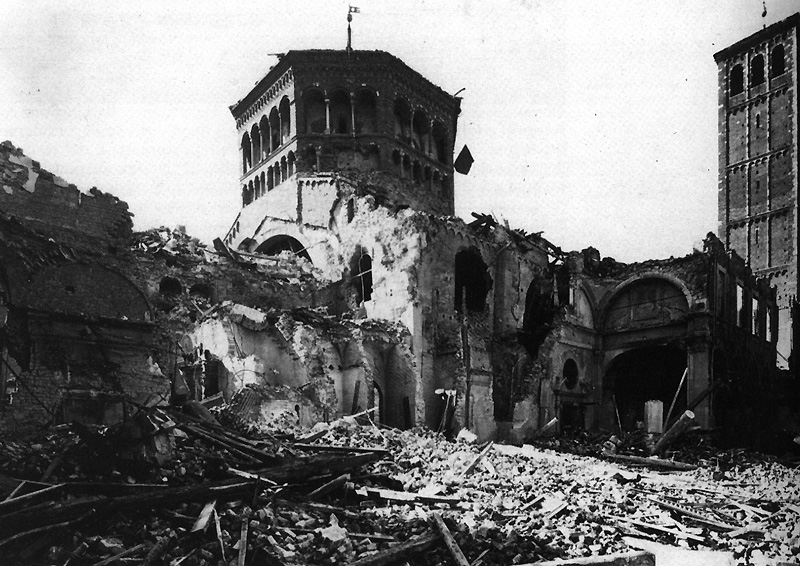 La distruzione di Sant'Ambrogio a Milano per opera dei bombardamenti della Seconda guerra mondiale nel 1943. Scansione di una foto non artistica il cui autore è sconosciuto.